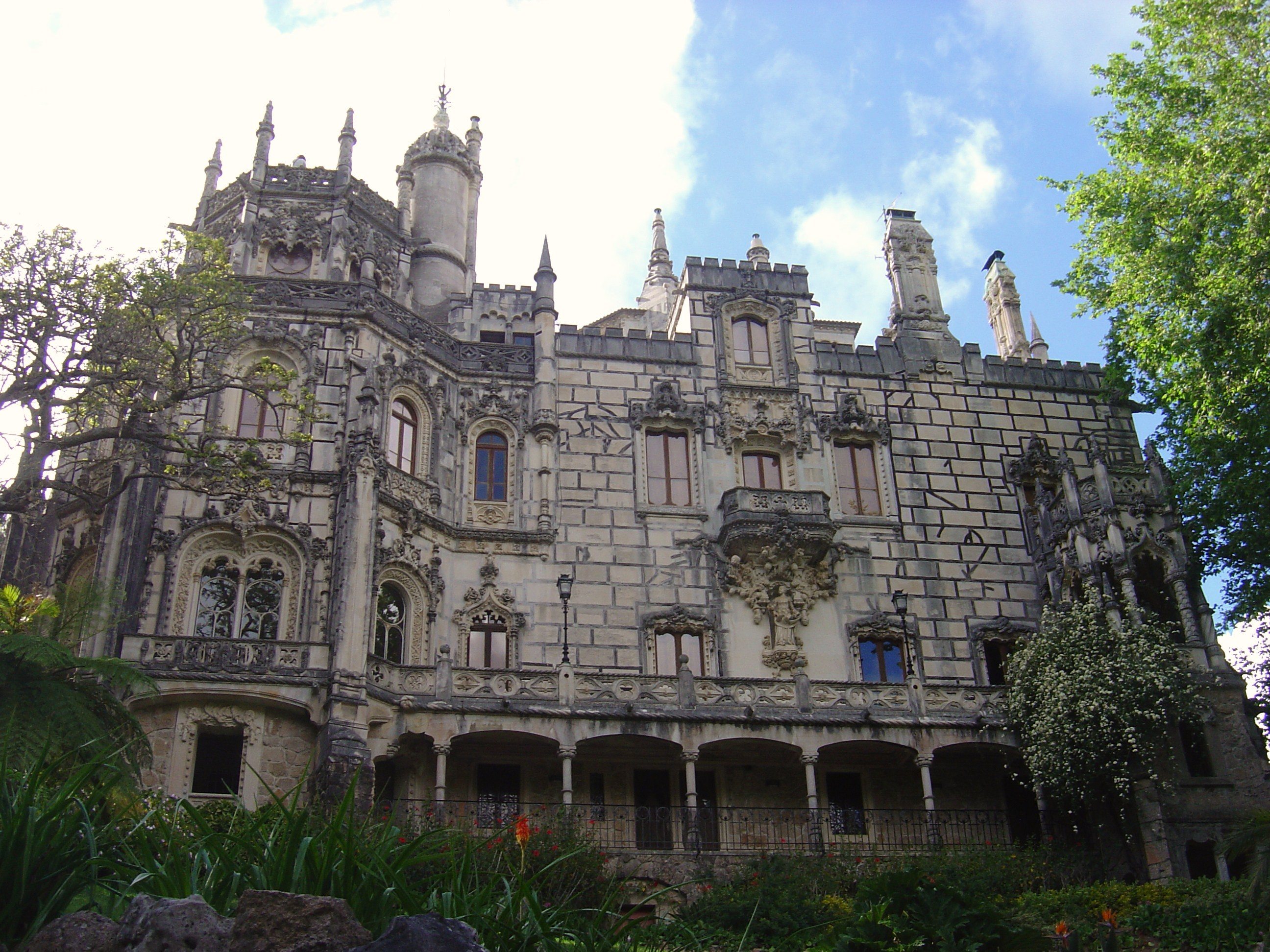 Quinta da Regaleira, Sintra, Portugal